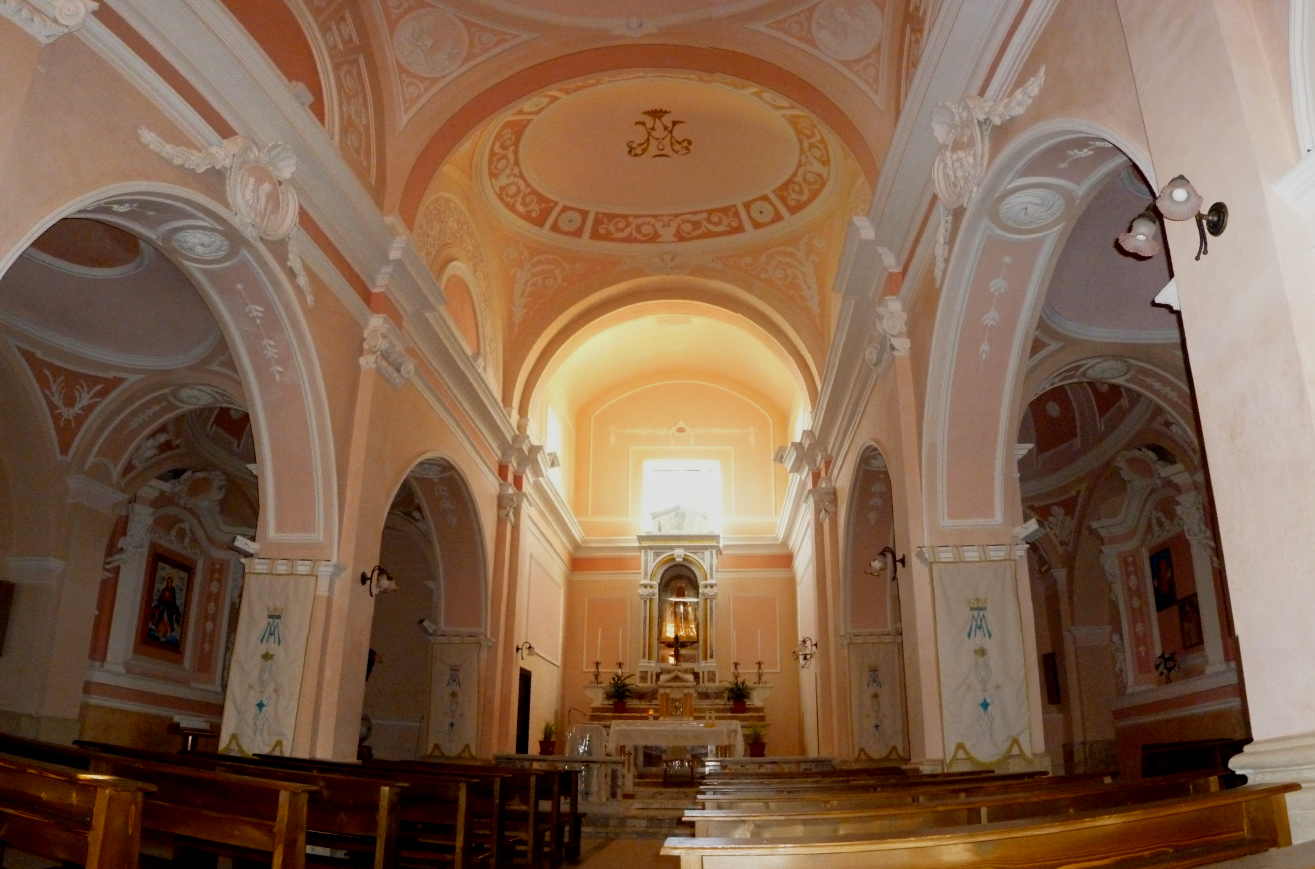 Interno della chiesa di Santa Maria Assunta, Palombaro, Chieti.